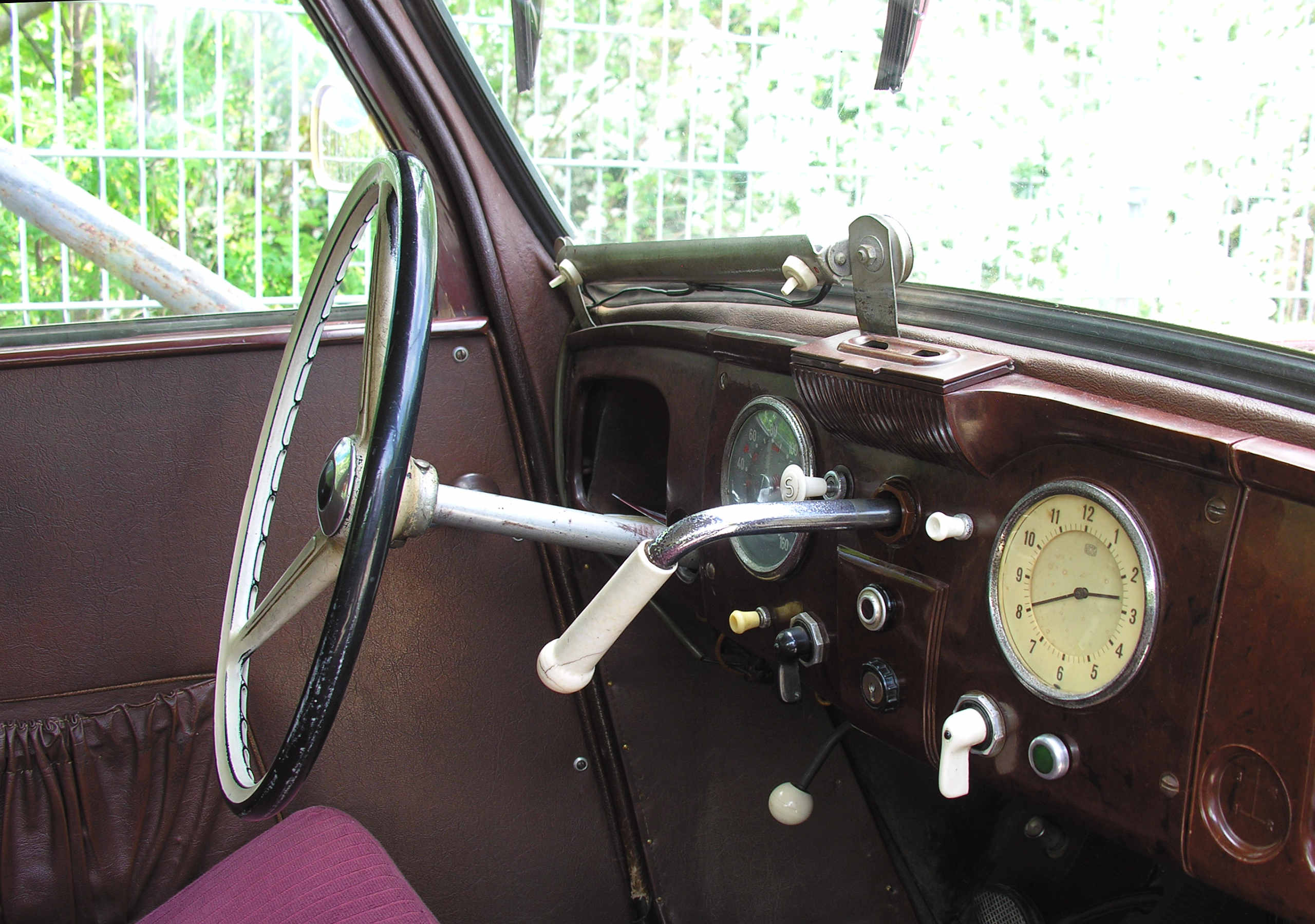 F8 DKW Auto Union Armaturenbrett Cockpit - Foto Wolfgang Pehlemann DSCN1898